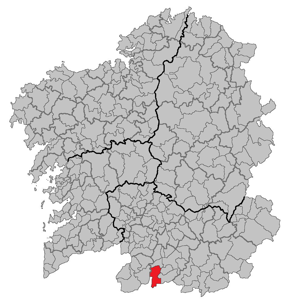 Mapa coa localización do concello de Calvos de Randín.